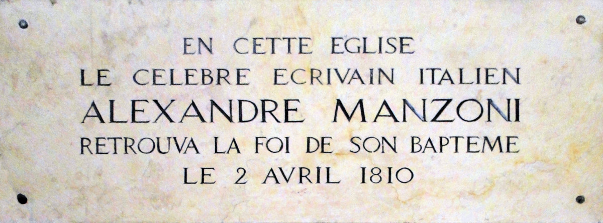 Lapide nella chiesa di San Rocco (Parigi) a ricordo di Alessandro Manzoni